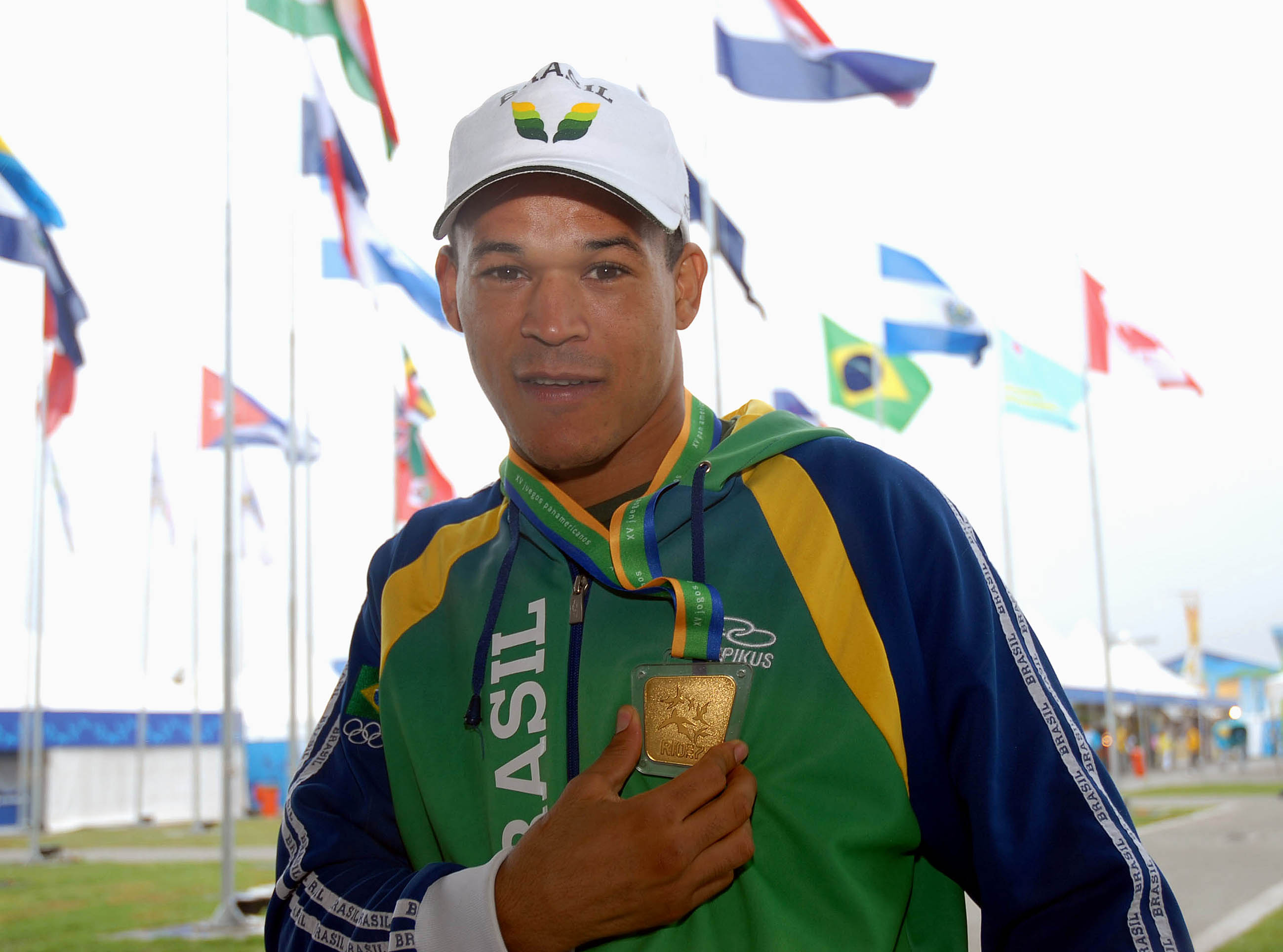 O boxeador brasileiro Pedro Lima